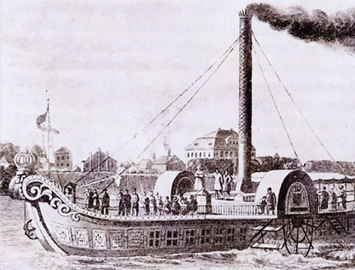 Der Seitenraddampfer Königin Maria war eines der ersten in Deutschland erbauten Dampfschiffe auf der Oberelbe.